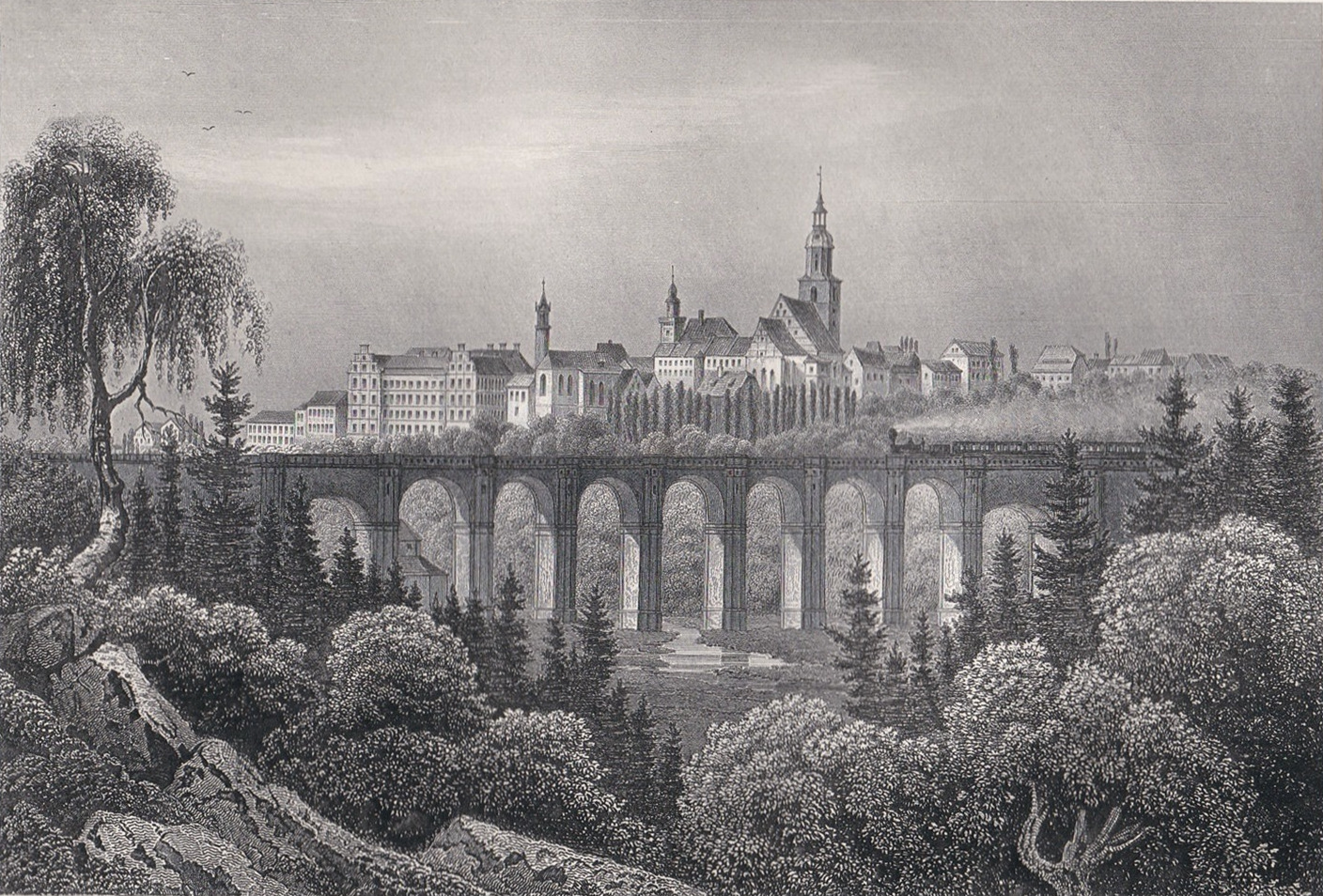 Historische Ansicht von Löbau in Sachsen. Stahlstich.